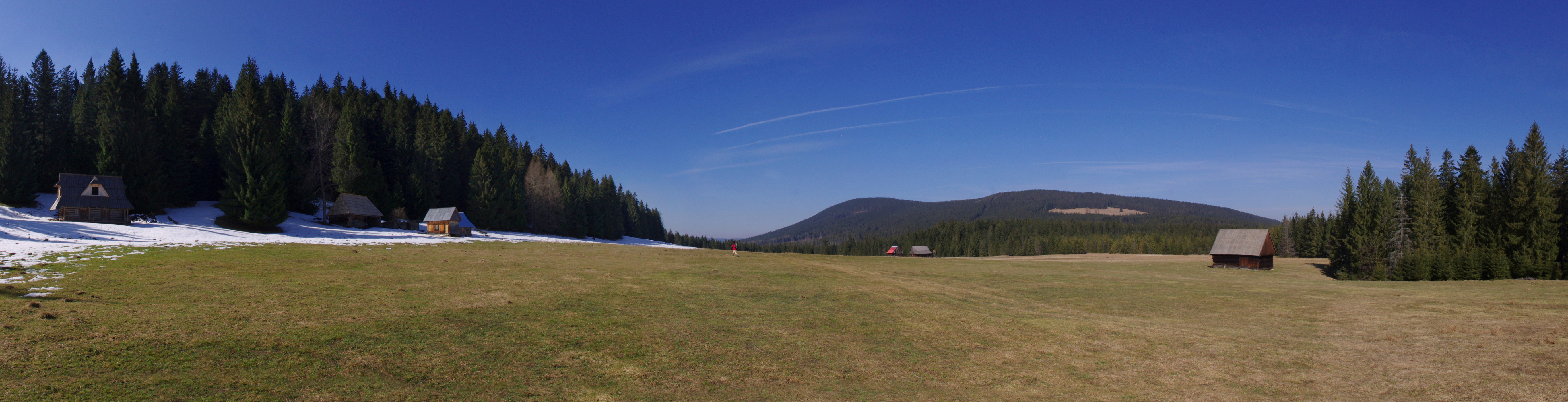 panorama z polany Molkowka